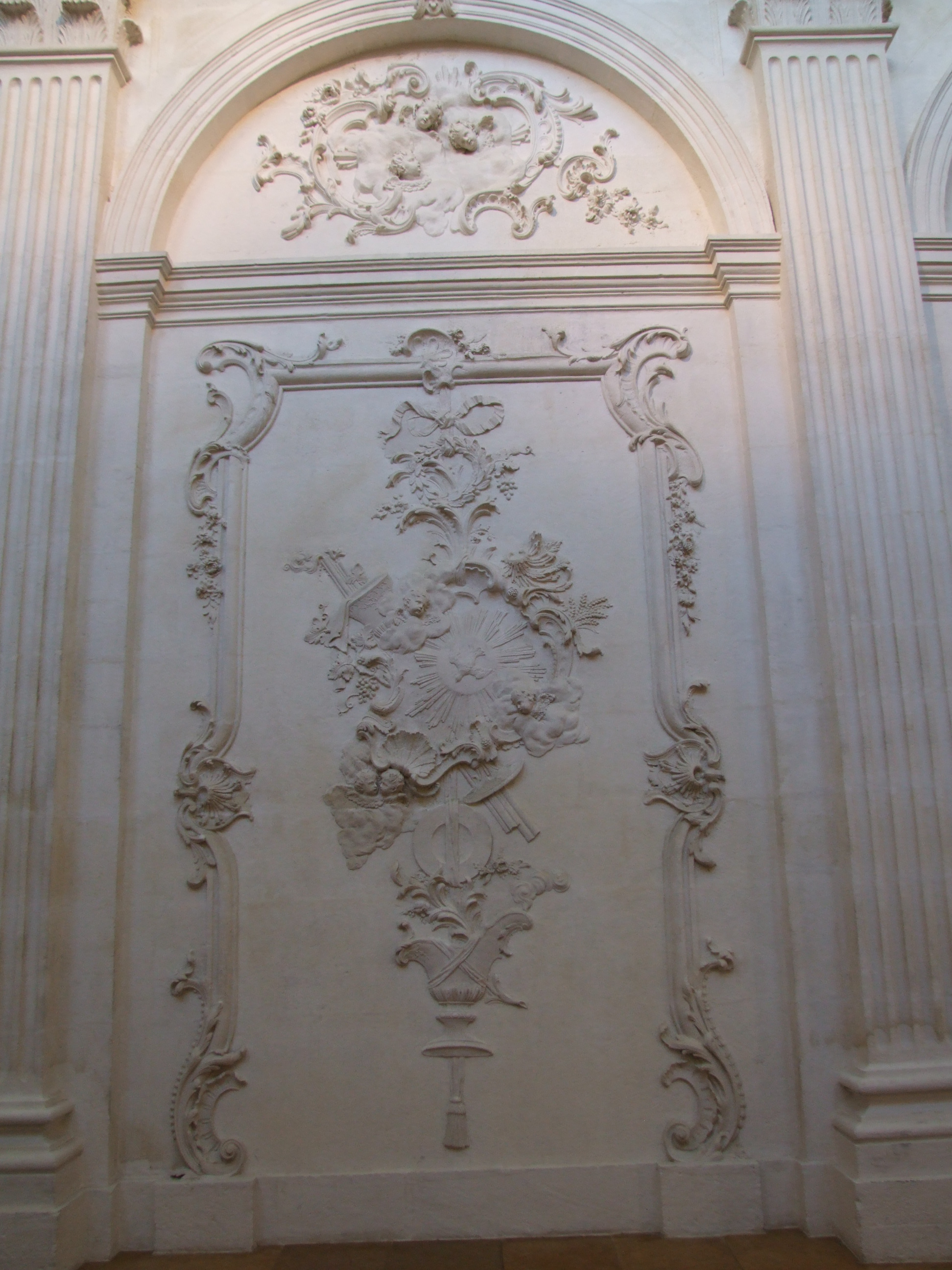 Chapelle des Elus, Palais des Ducs, Dijon, Côte-d'Or, Bourgogne, FRANCE